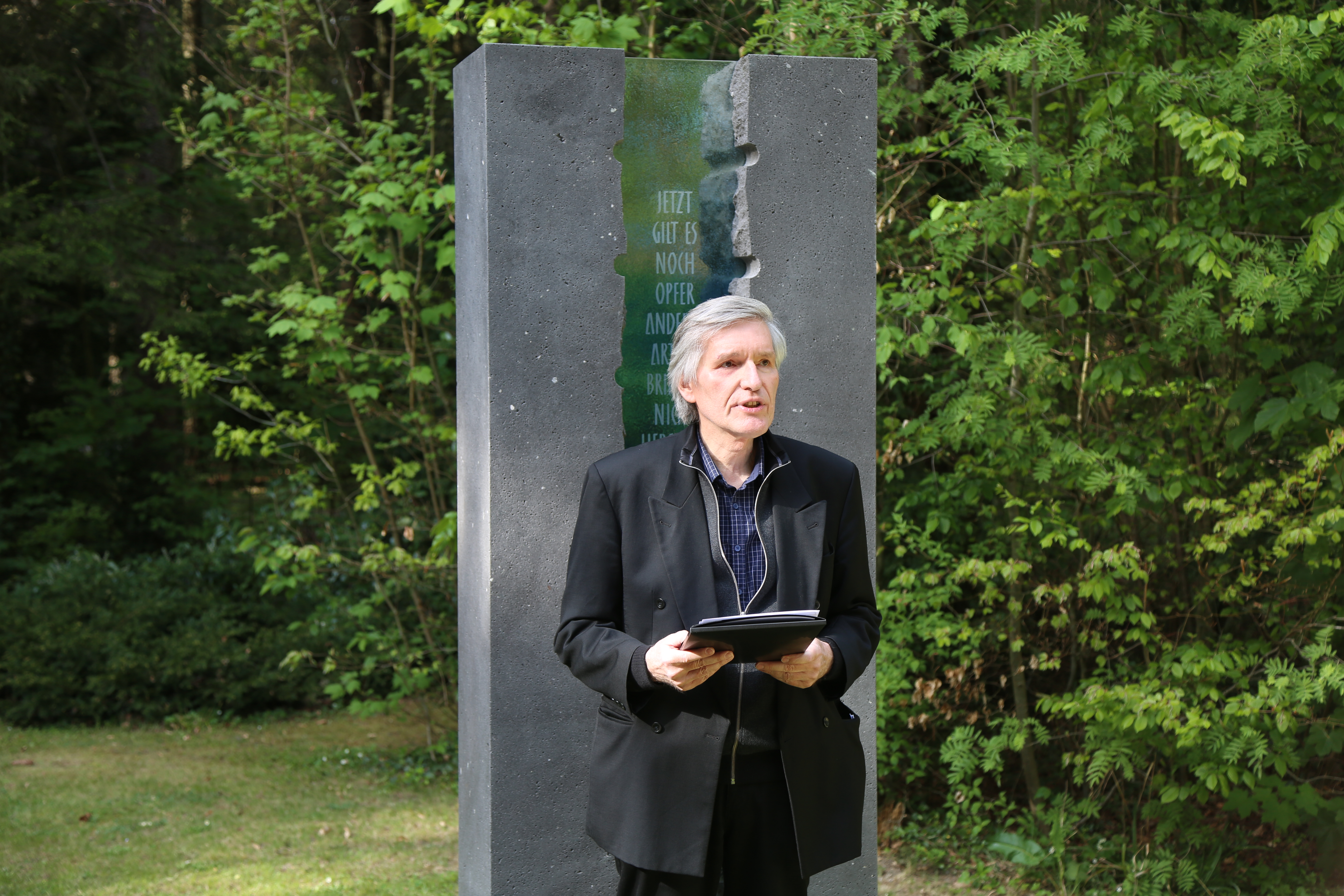 Siegberg Wolf, deutscher Historiker, Politologe und Publizist. Bei einer Ansprache zum 100. Todestag von Gustav Landauer an der Landauer-Stele im Münchner Waldfriedhof